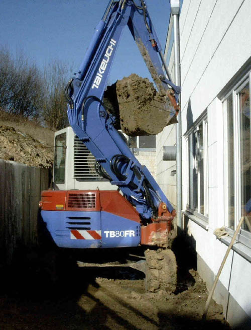 Hüllkreisbagger - Durch die beengten Raumverhältnisse sieht man den besonderen Vorteil der Konstruktion. Hier dreht sich ein 8 to Bagger, wo der Platz für einen 2,5 Tonner normaler Konstuktion nicht reichen würde.